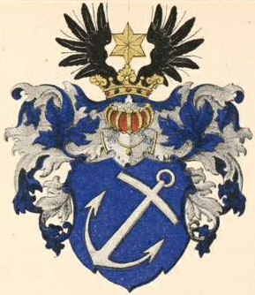 Gerneti suguvõsa aadlivapp